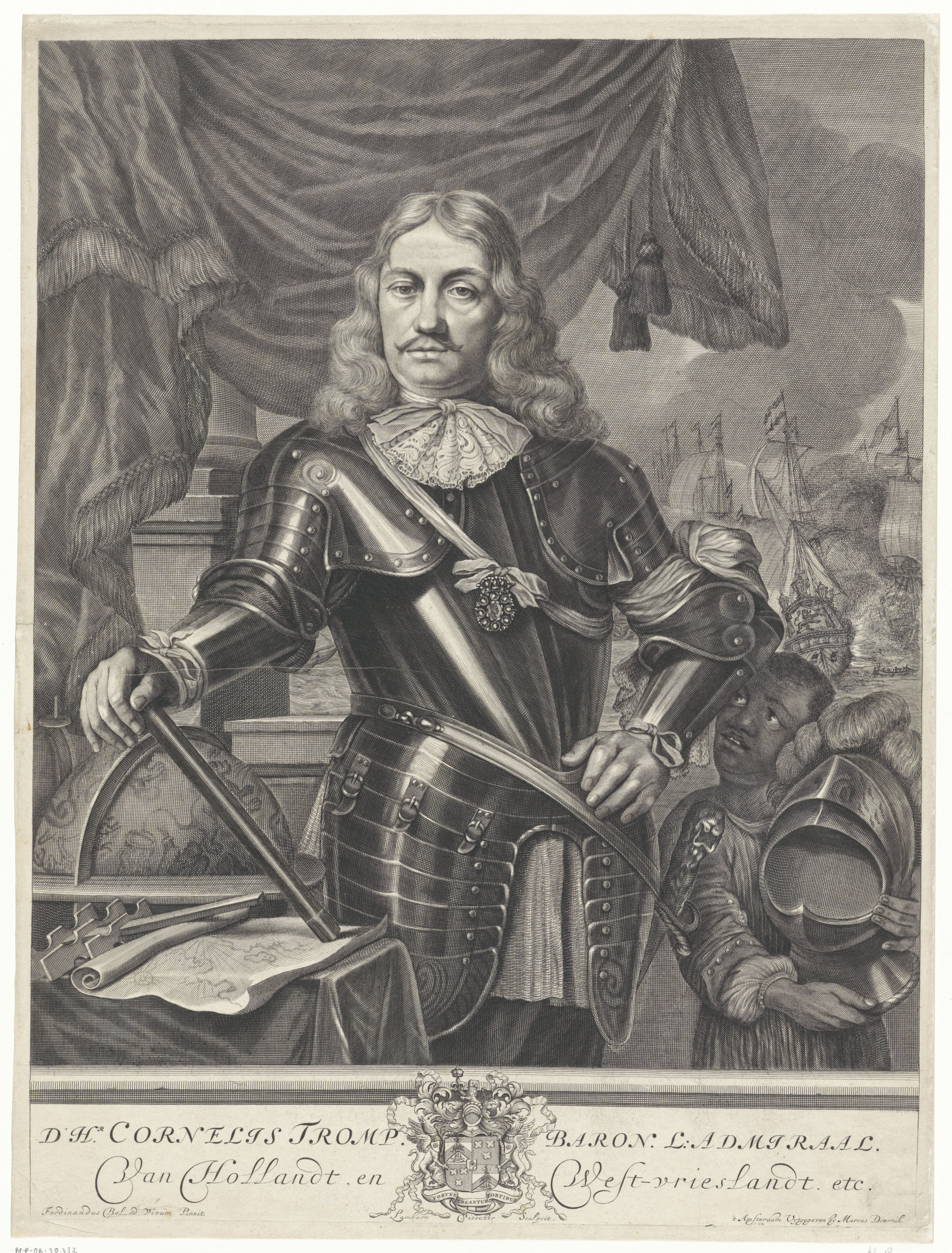 Portret van Cornelis Tromp; Objectnummer RP-P-OB-70.332; Catalogusreferentie: Hollstein Dutch 29-2(2) Opschriften / Merken: verzamelaarsmerk, verso, gestempeld: Lugt 2228. Omschrijving: Luitenant-admiraal-generaal, Cornelis Tromp, met in de rechterhand een commandostaf. Naast hem een donkere jongen die een helm draagt. Links een globe, een zeekaart en een roer. Op de achtergrond een zeeslag.